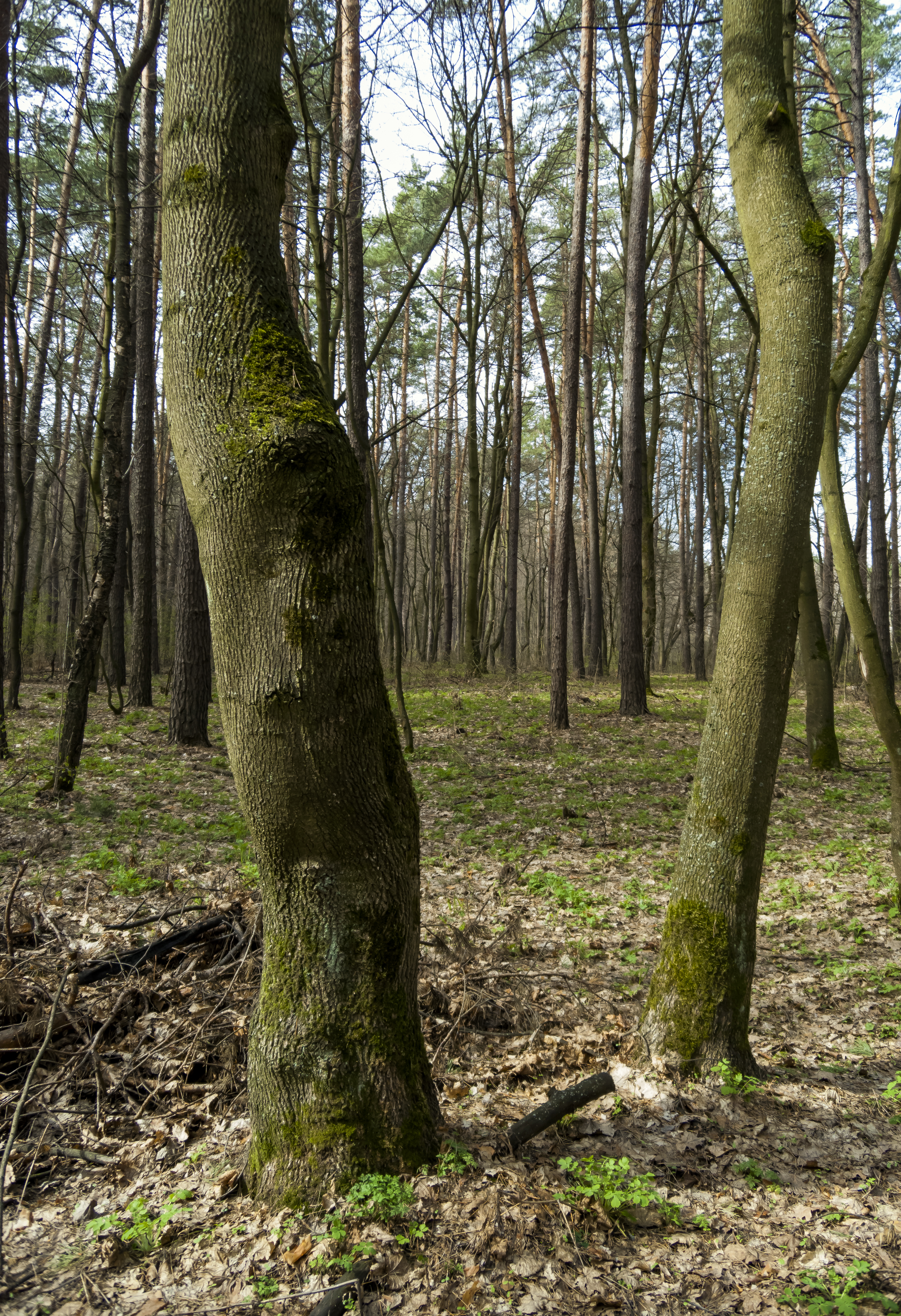 Белая дубрава в конце марта.